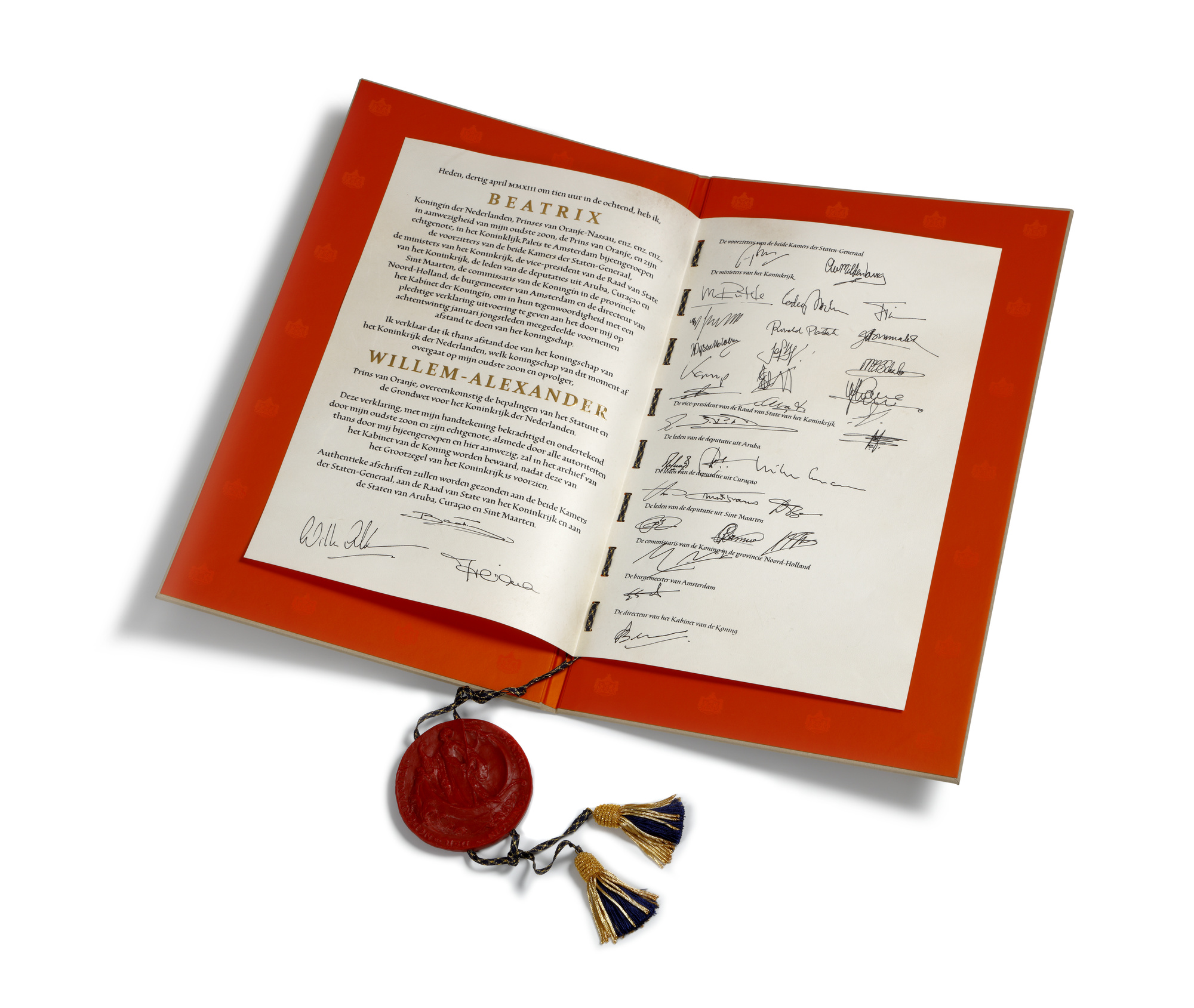 Abdicatie van Beatrix Kabinet der Koningin, inventarisnummer 19196A